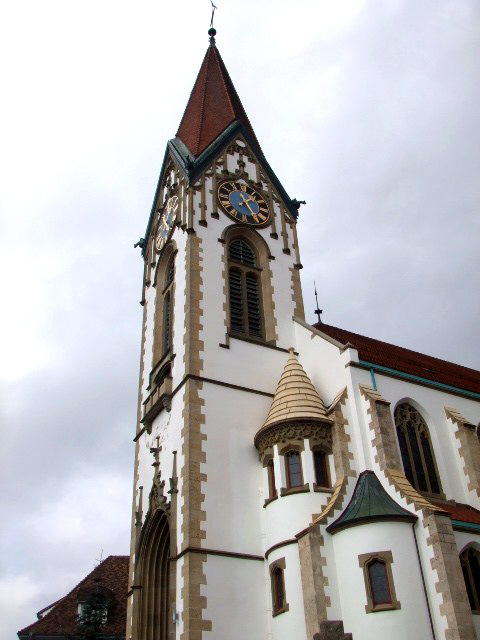 Pfarrkirche St. Dionysius, Gailingen am Hochrhein Turm